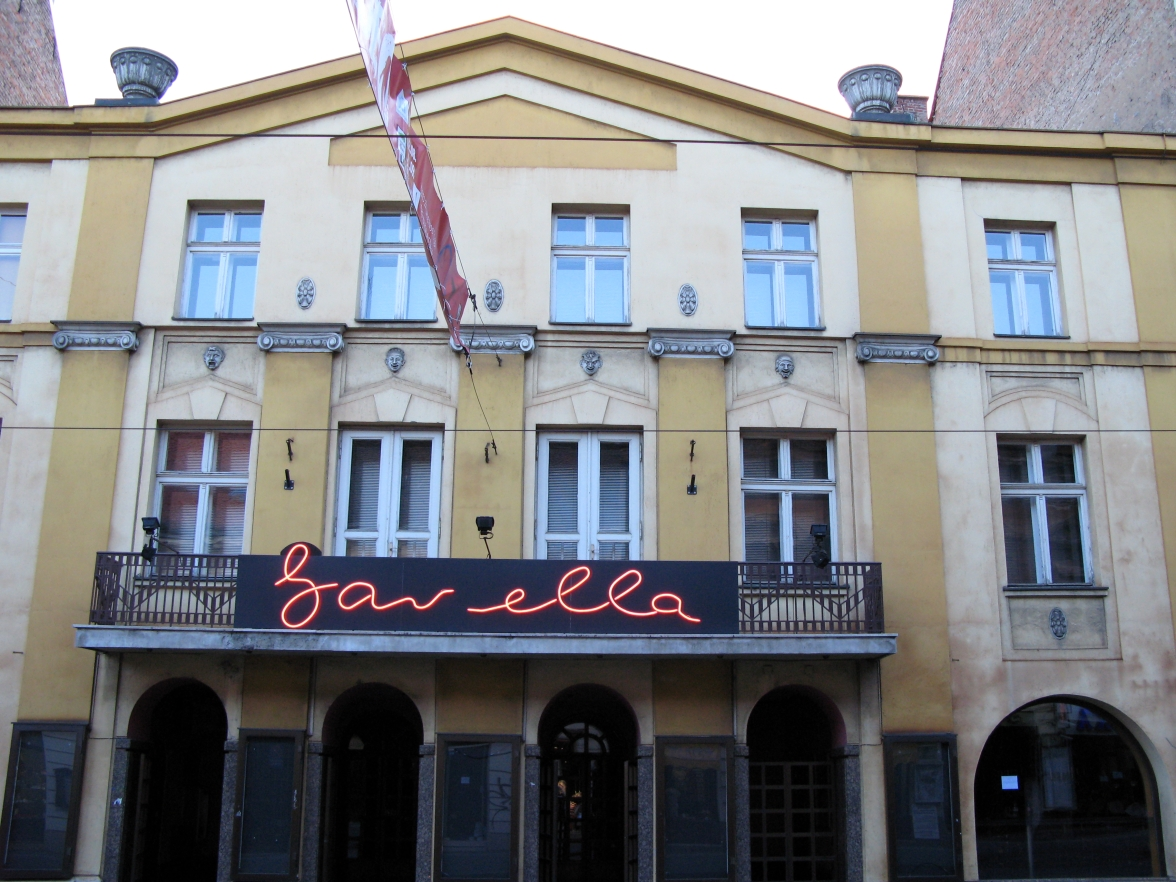 kazalište Gavella, Zagreb